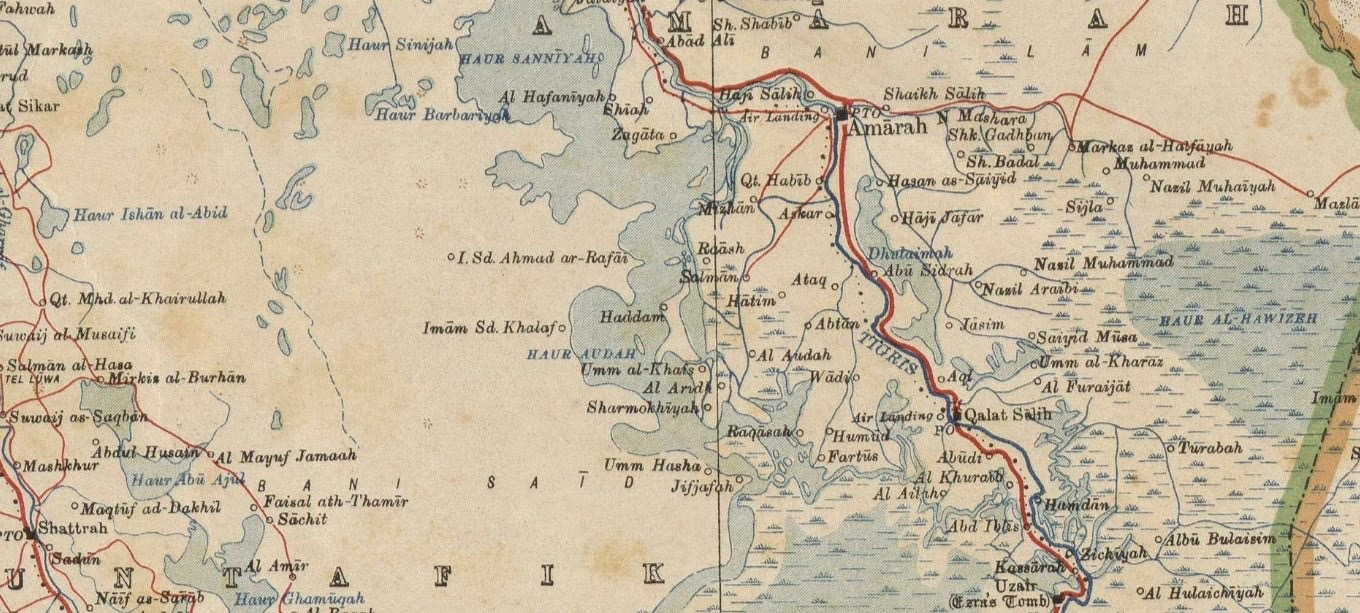 خريطة قديمة لجنوب العراق، وتضهر المجر الكبير بالتسمية القديمة وهي (وادي أو سوق وادي)